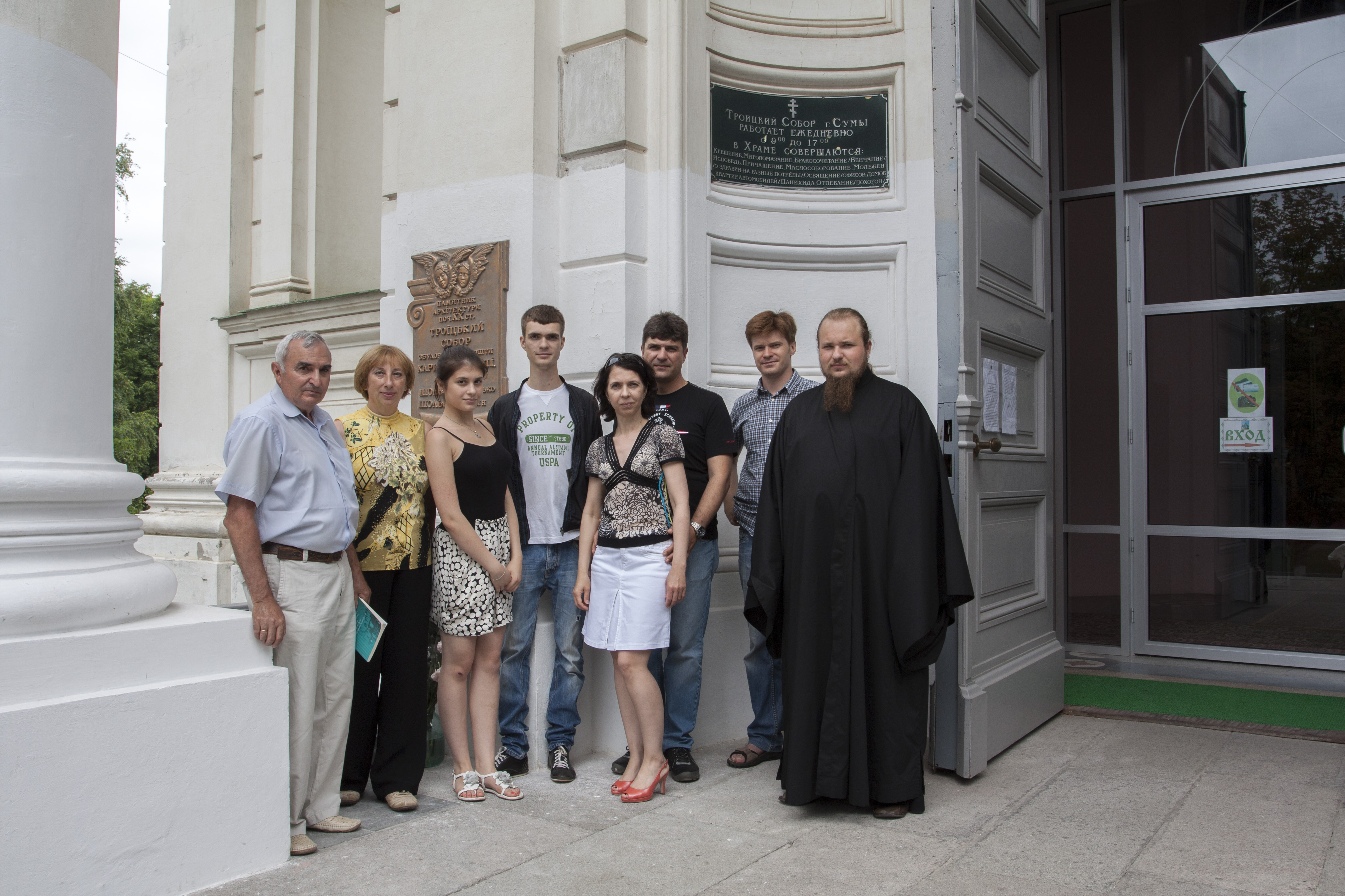 Потомки Карла Густавовича Шольца на открытии мемориальной таблички возле входа в Троицкий собор. Город Сумы 2013 год.